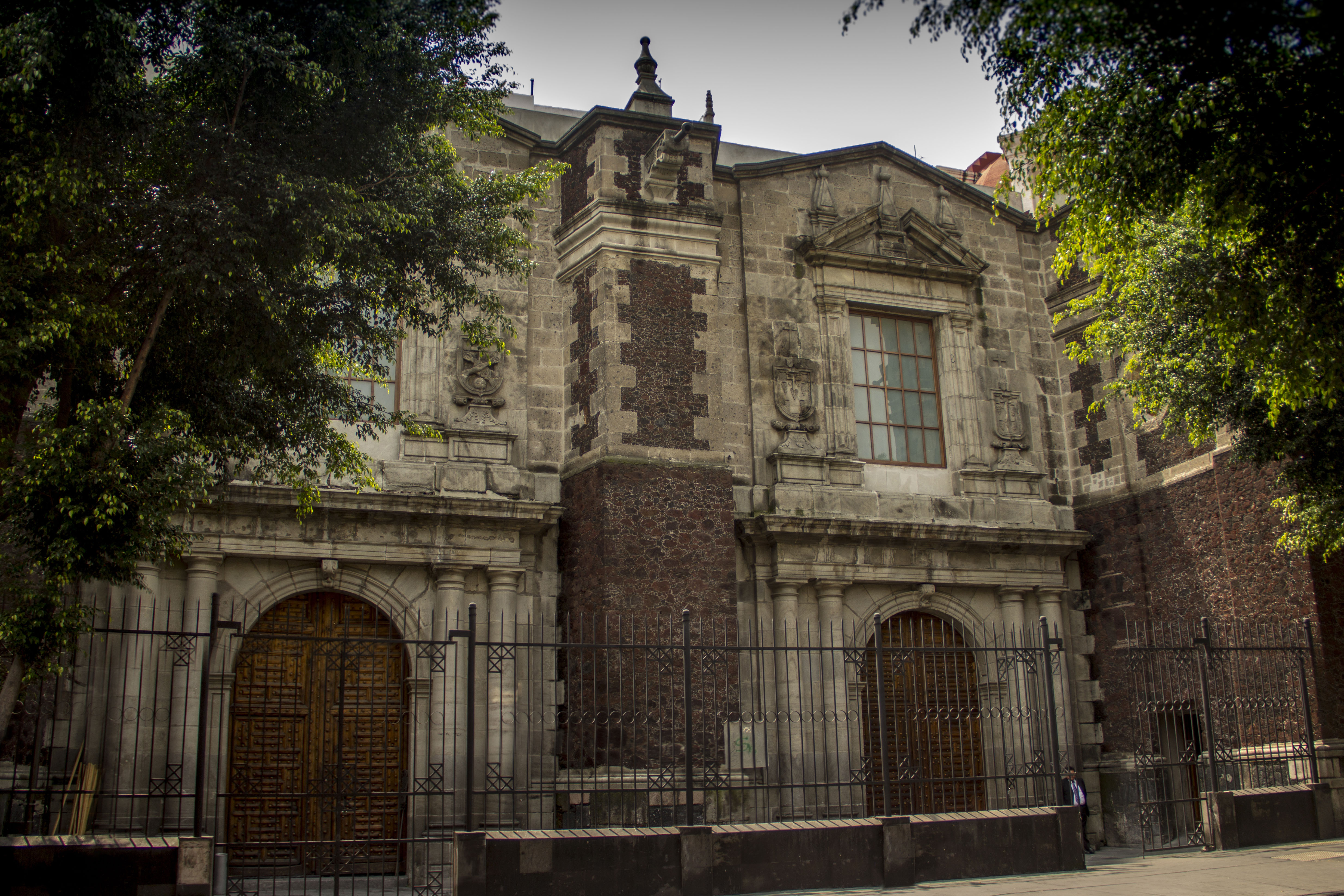 Antiguo Templo de Santa Clara y Capilla de la Concepción